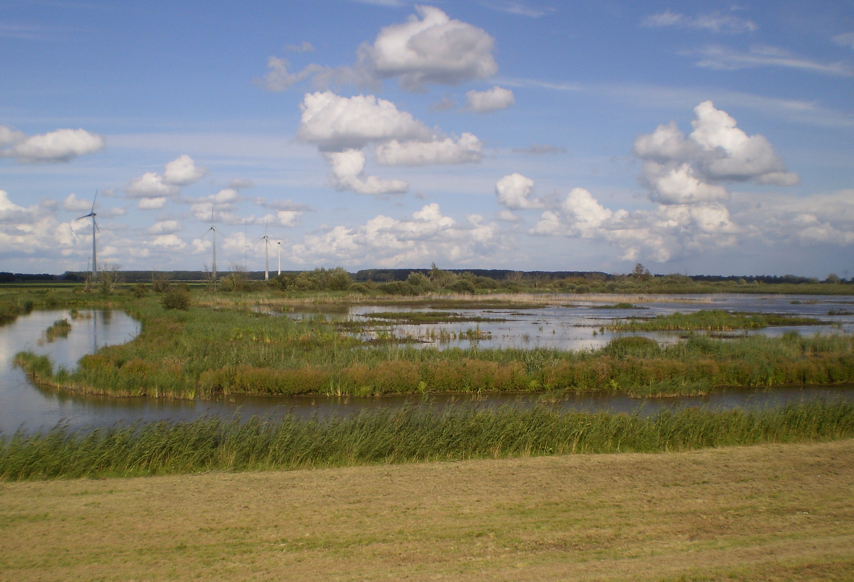 Natuurgebied 'Harderbroek' in Flevoland, langs de weg van Harderwijk naar Zeewolde